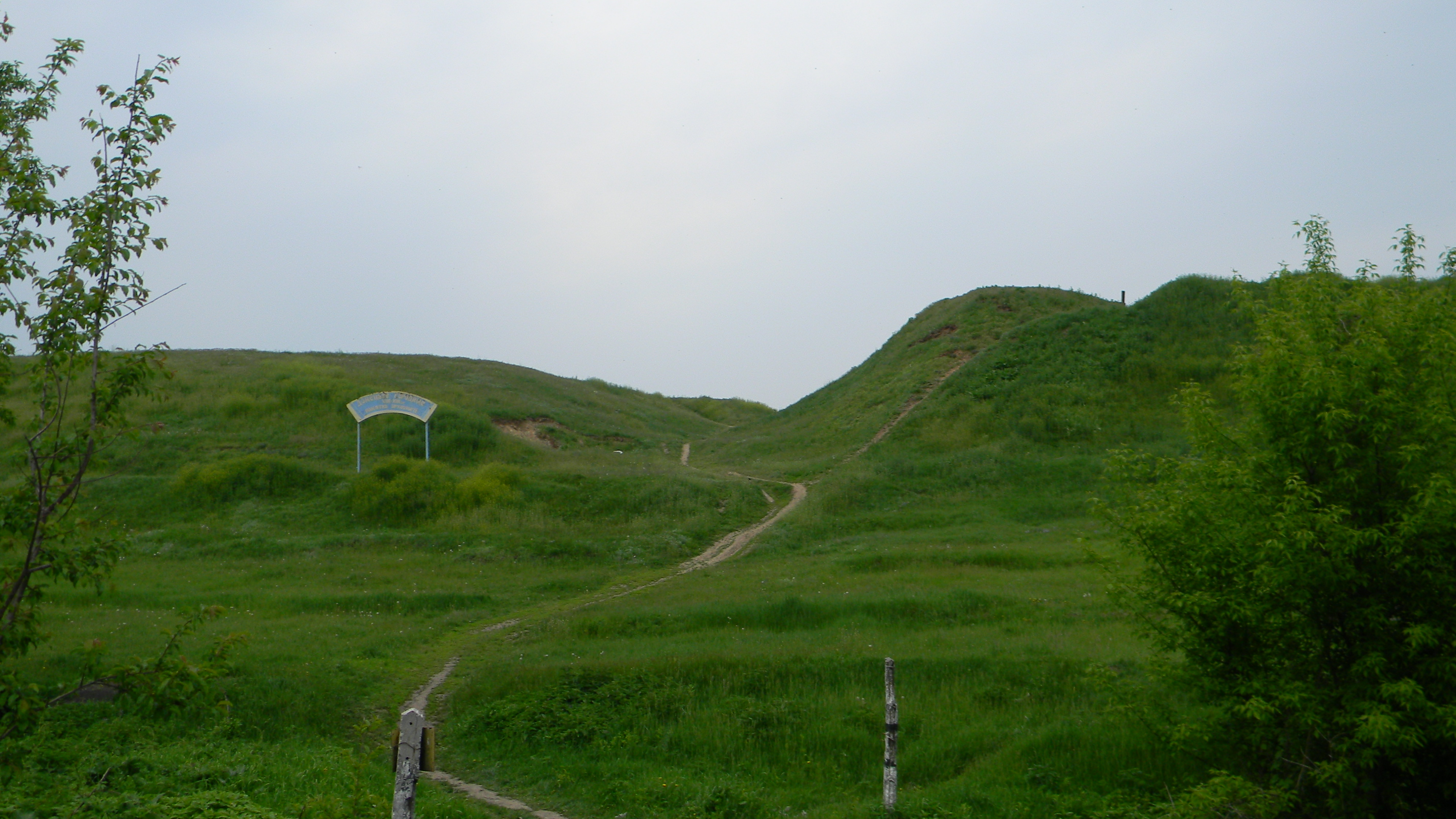 Донецкое городище